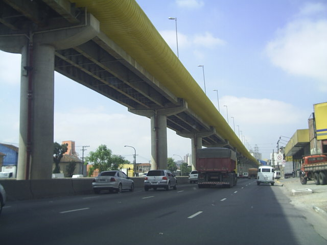 Expresso Tiradentes, São Paulo, SP, Brasil.